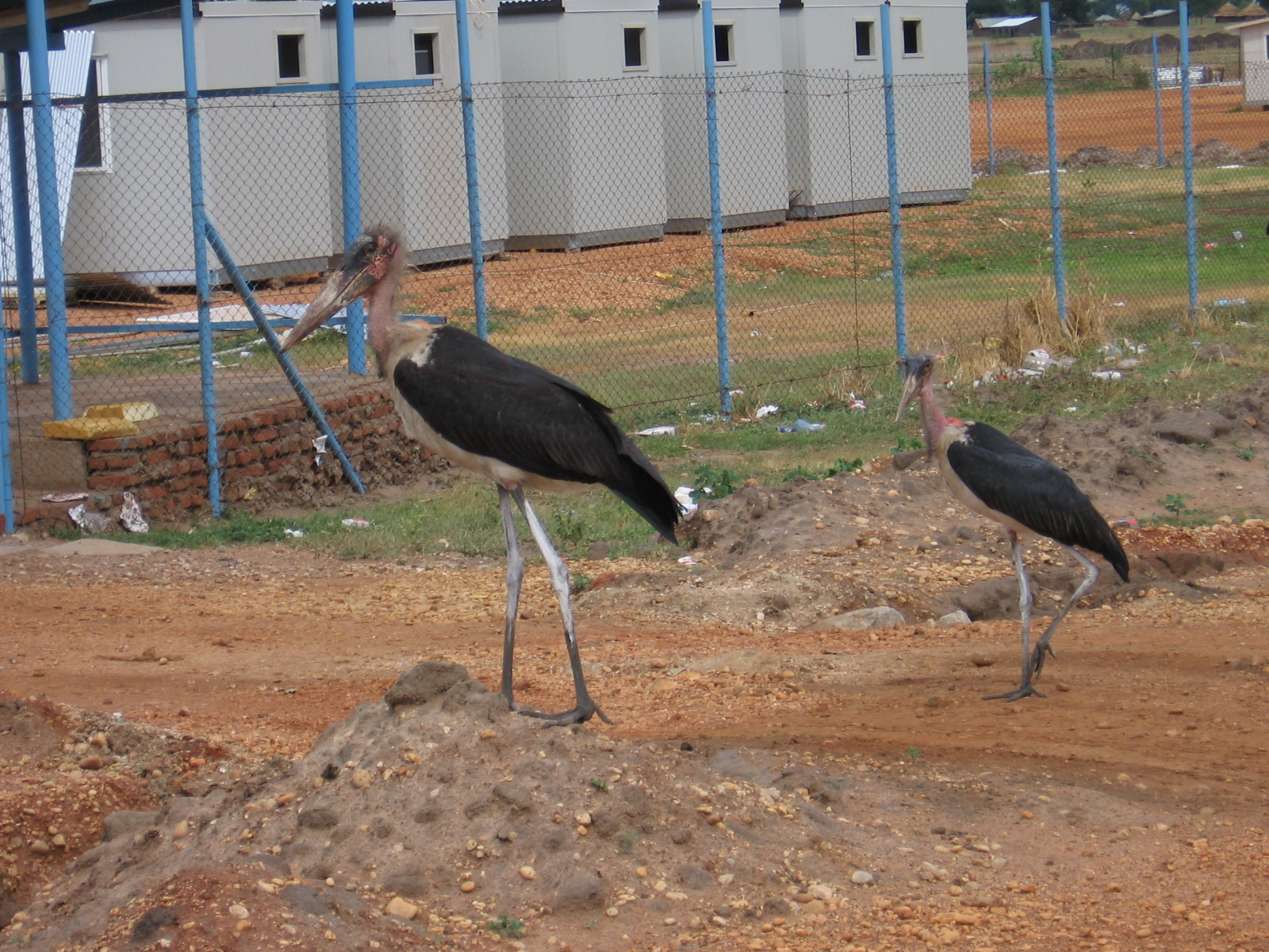 Марабу - лучшие союзники в борьбе со змеями.